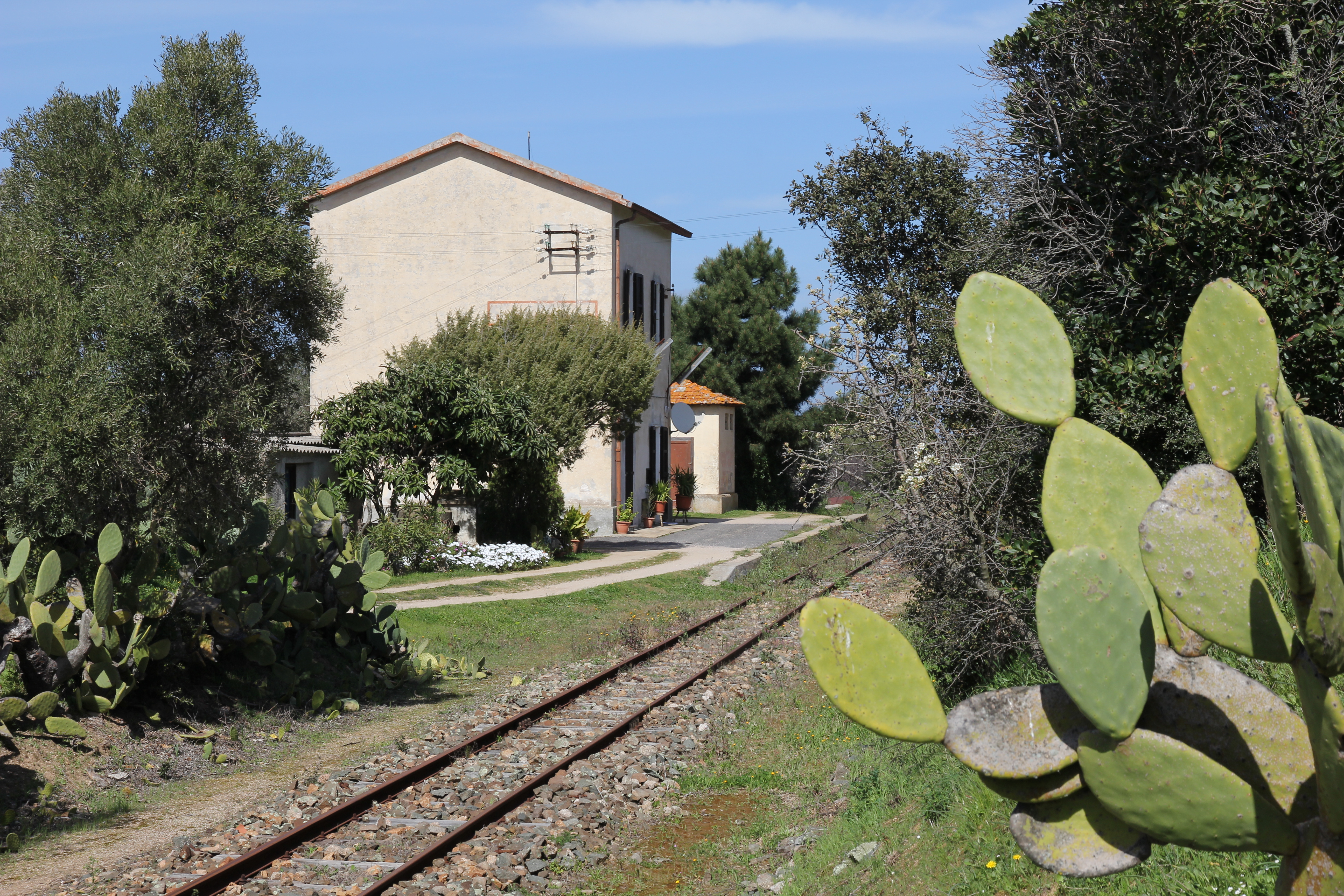 Calangianus - Stazione ferroviaria di San Leonardo